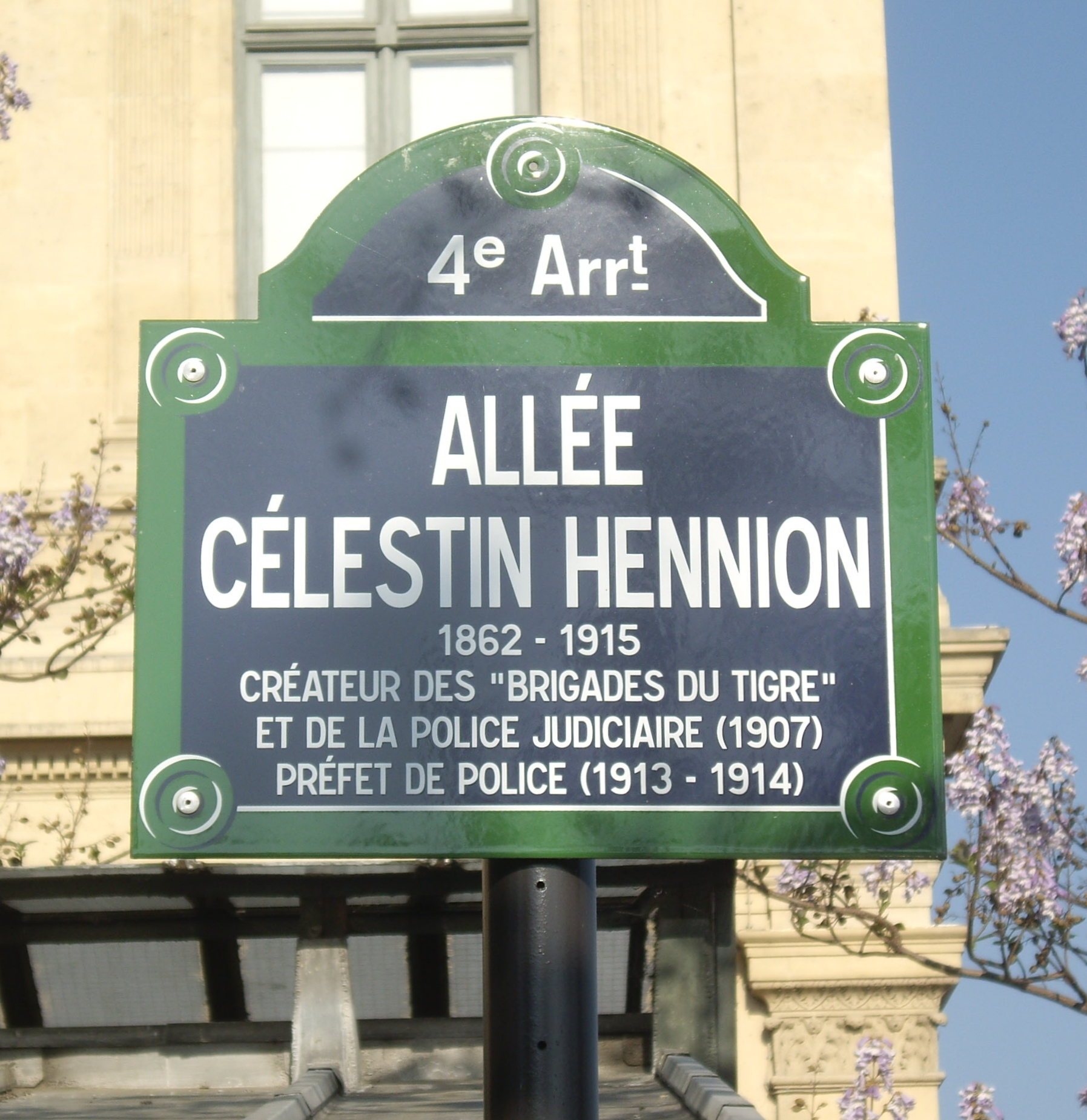 Allée Célestin-Hennion, Paris 4e. « Célestin Hennion, 1862-1915, créateur des "Brigades du Tigre" et de la police judiciaire (1917), préfet de police (1913-1914). »